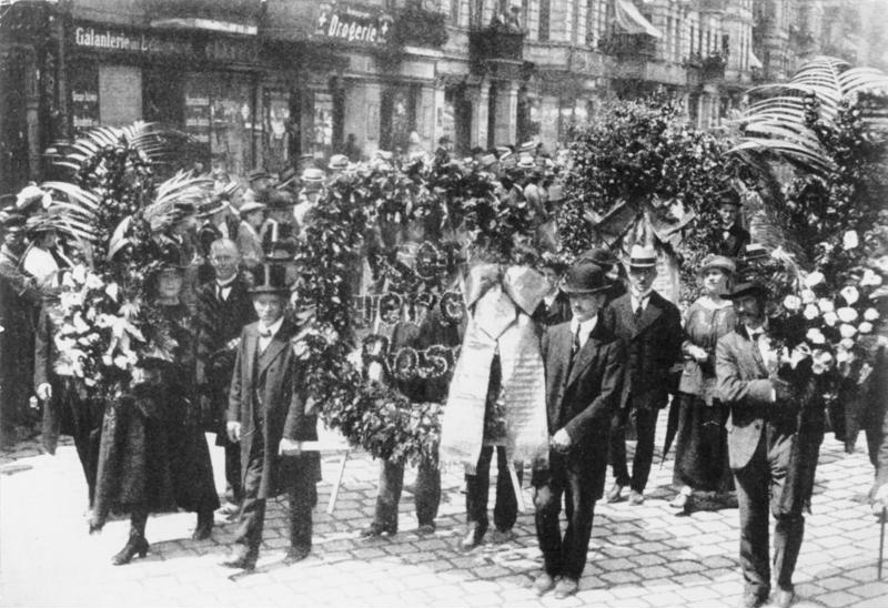 Die Beisetzung von Rosa Luxemburg am 13. Juni 1919. Riesige Kranzspenden am Anfang des Trauerzuges.